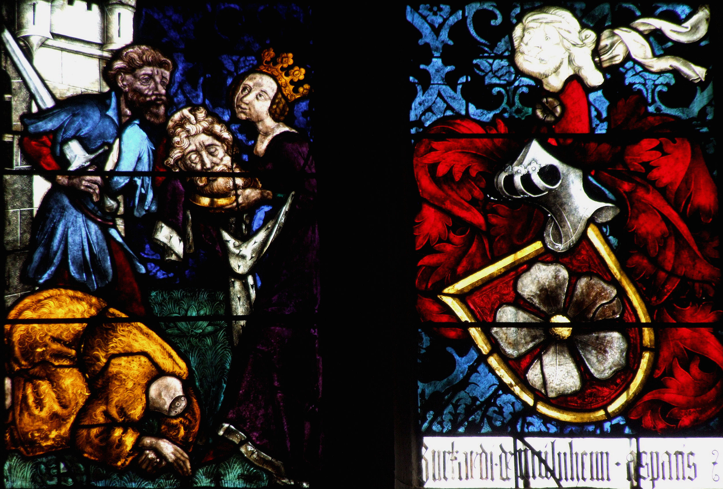 Walbourg - Eglise Sainte-Walburge - Vitrail du cycle de Jean - Décollation et écusson de la famille de Müllenheim